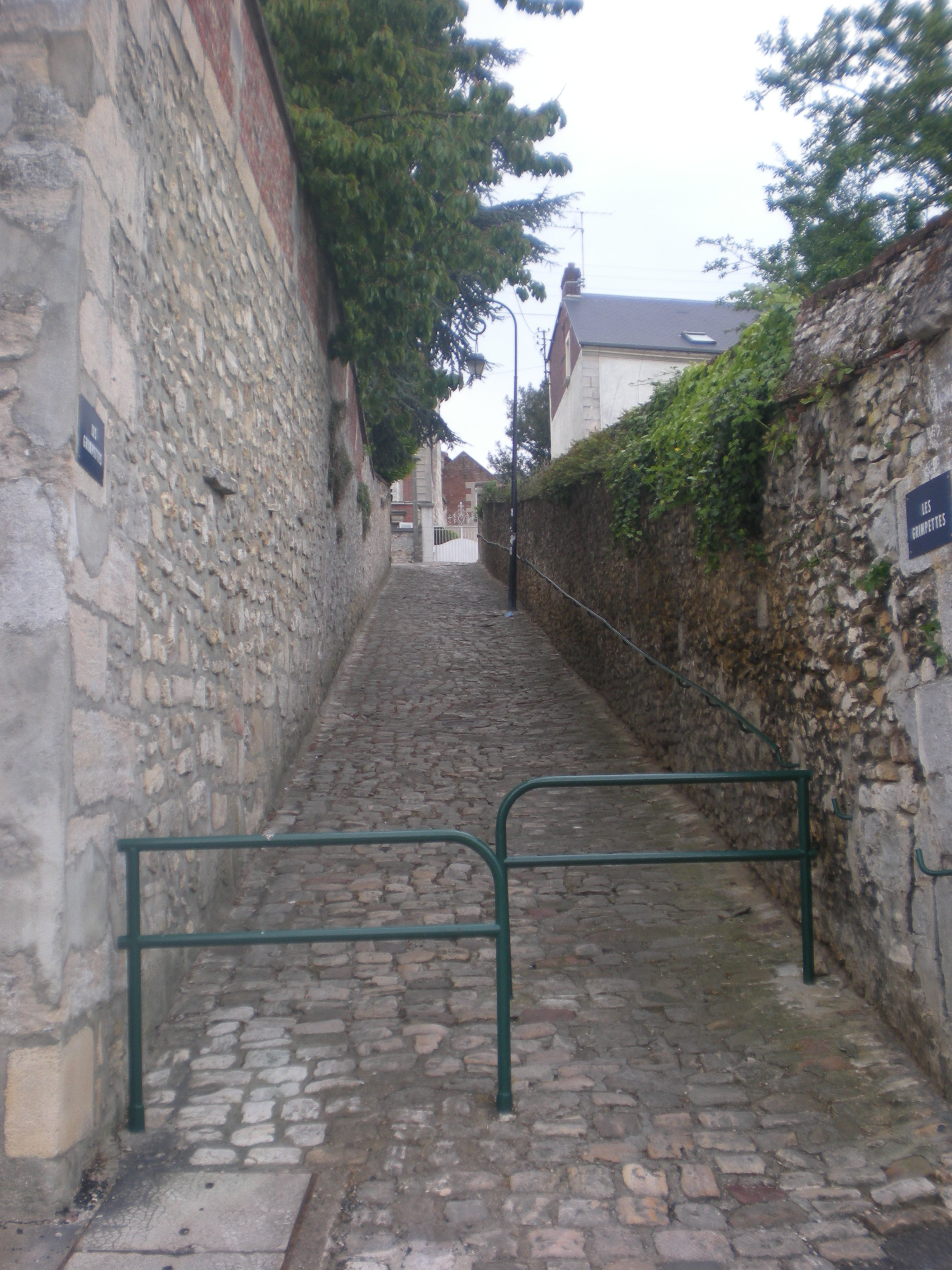 La ruelle de Grimpettes